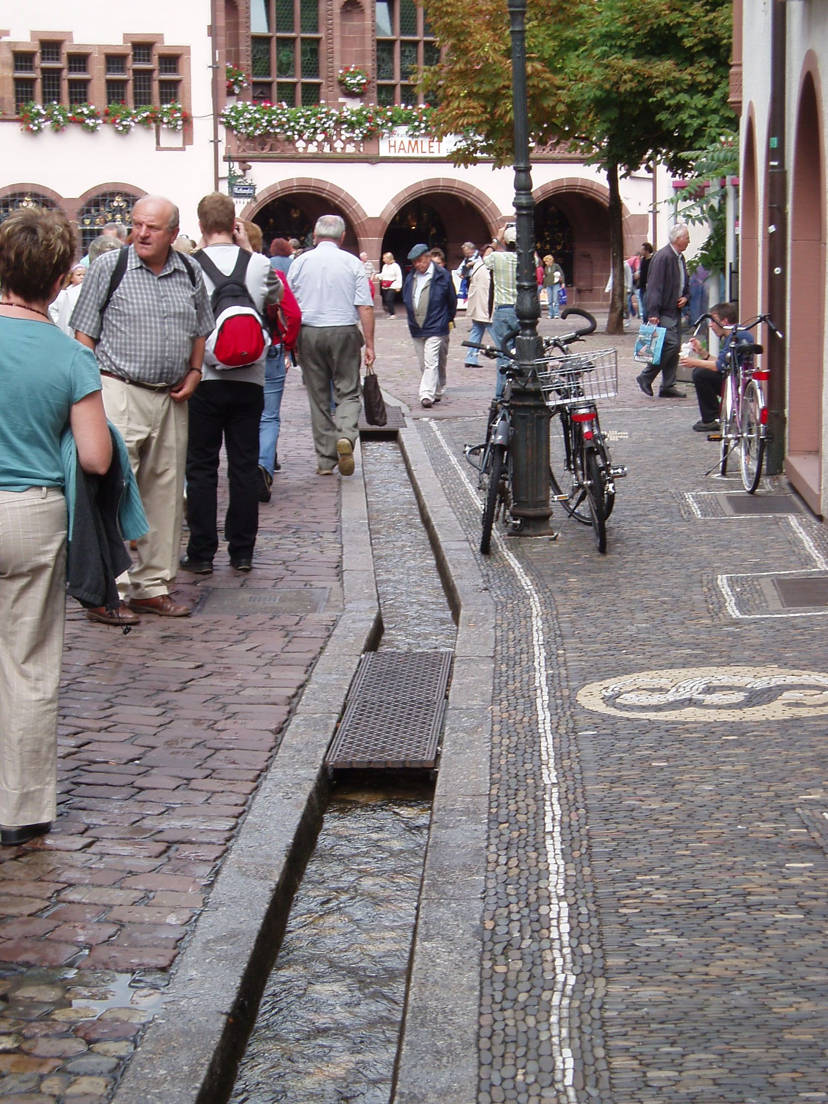 Freiburger Bächle mit Neuem Rathaus im Hintergrund